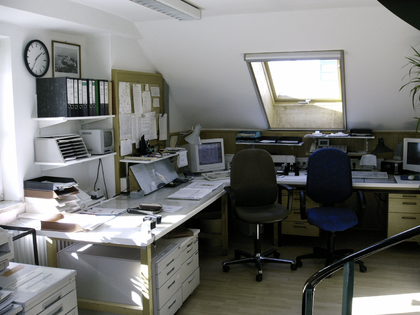 Hohenpeißenberg Observatorium Büro